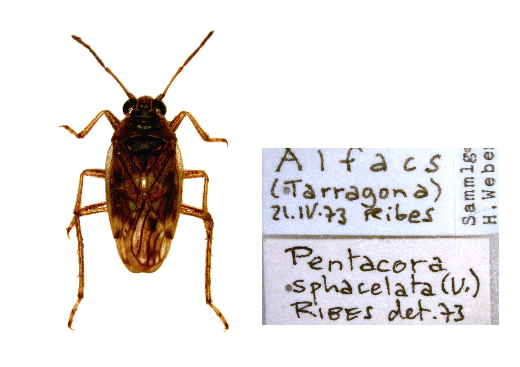 Pentacora sphacelata (Uhler, 1877), syn. P. iberica Wagner, 1953. Präparat aus der Zoologischen Staatssammlung München, mit Etiketten.